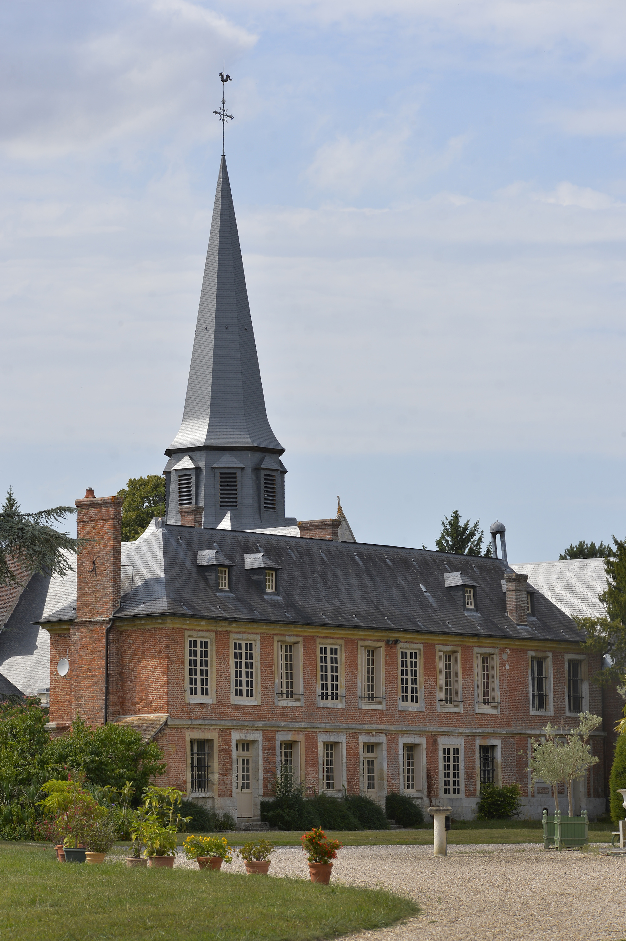 Monsieur d’Acquigny désira se retirer du monde et vivre selon la règle de la Grande Trappe de Soligny. Ã cette fin, il fit construire en 1774 le Petit Château, connu pour être le plus grand ermitage privé de France. Il y vécut jusqu’à sa mort en 1788.